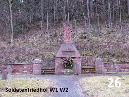 Ehrenmal für die Gefallen beider Weltkriege Standort: Soldatenfriedhof Gamburg